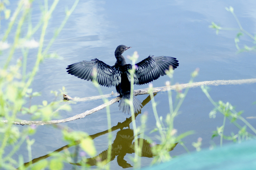 Ripa Bianca di Jesi This is a photo of a monument which is part of cultural heritage of Italy. The authorisation for taking photos of this object was provided by the World Wide Fund for Nature Italy.